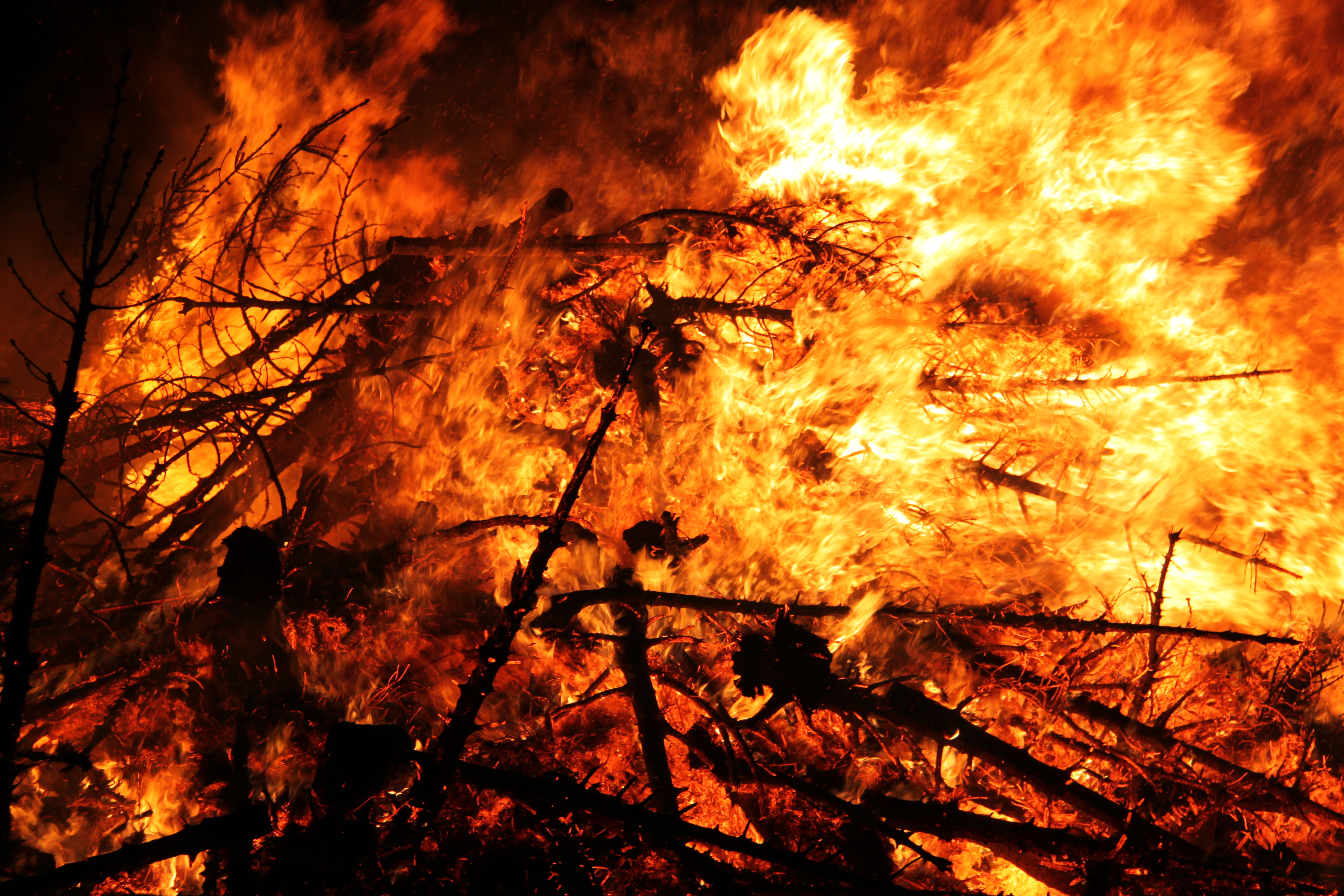 Kerstboomverbranding in De Pinte, Belgie